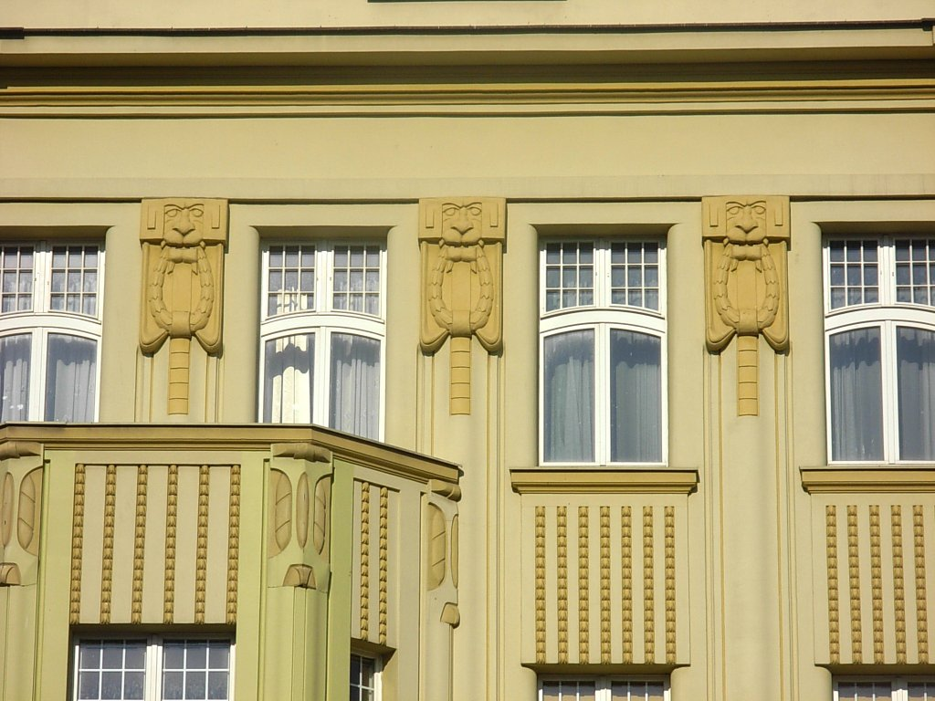 Kamienica ul. Mickiewicza 9 w Bydgoszczy, proj. Rudolf Kern, 1904-1905